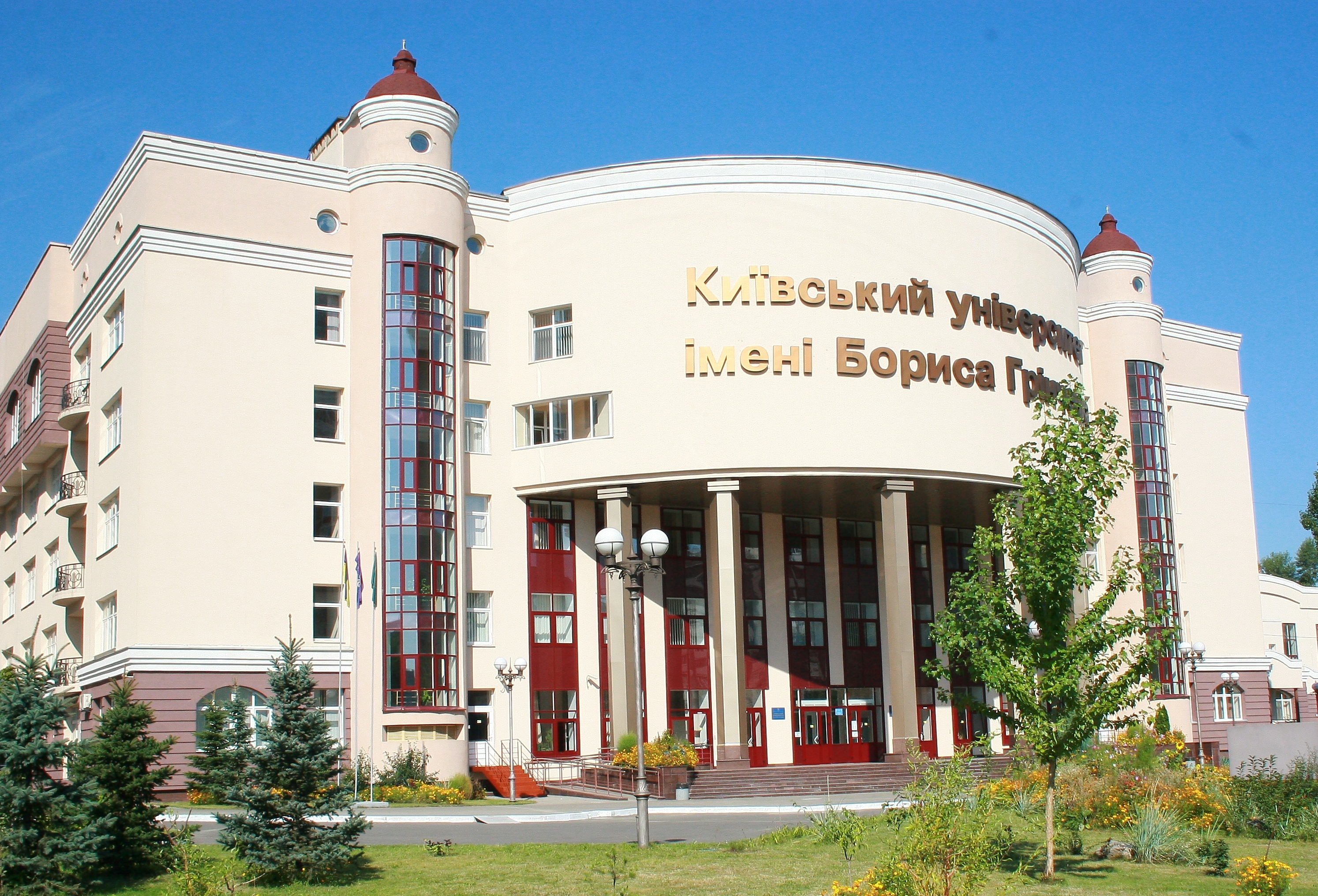 Grinchenko University